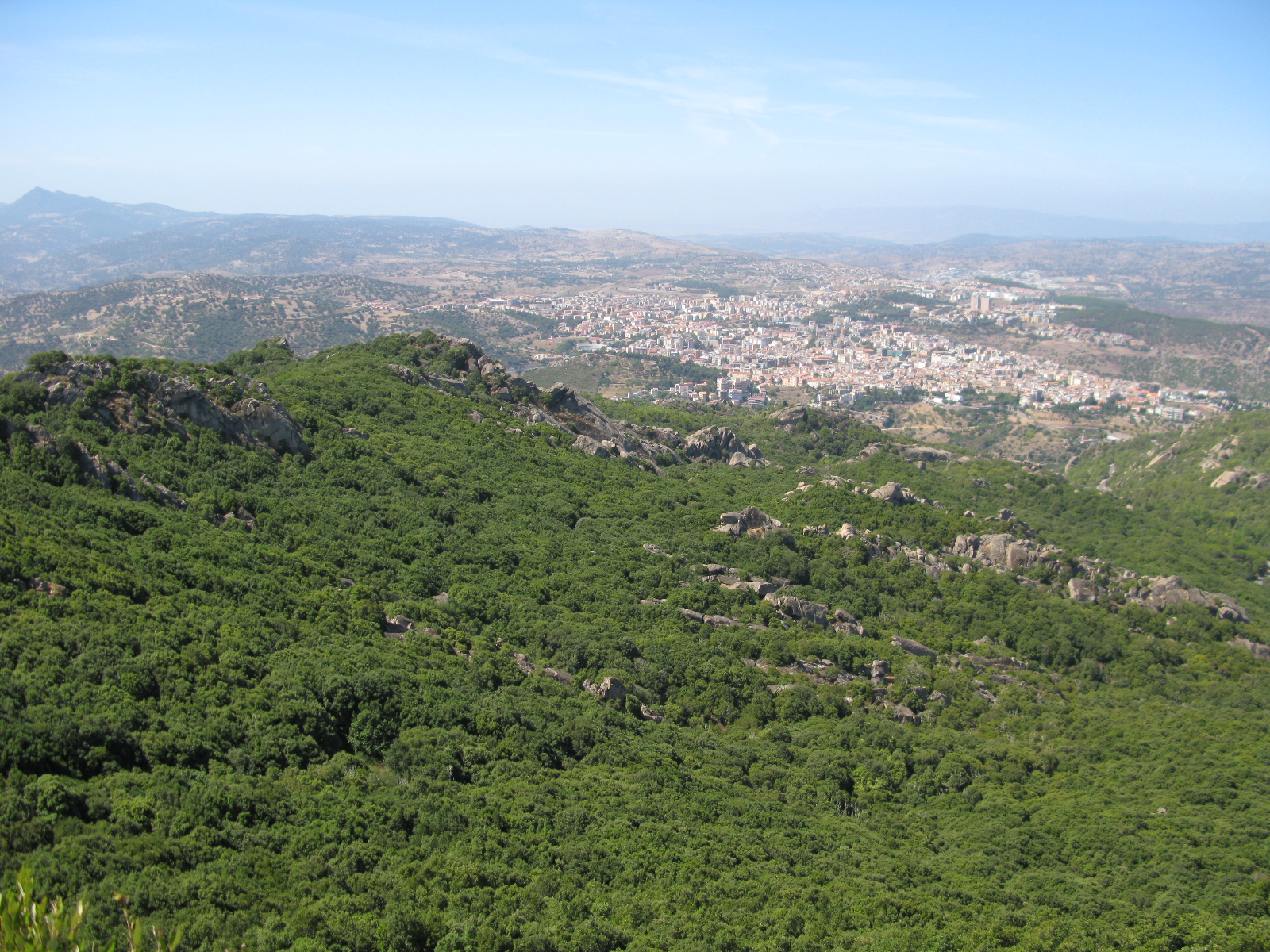 Vista su Nuoro dal Monte Ortobene